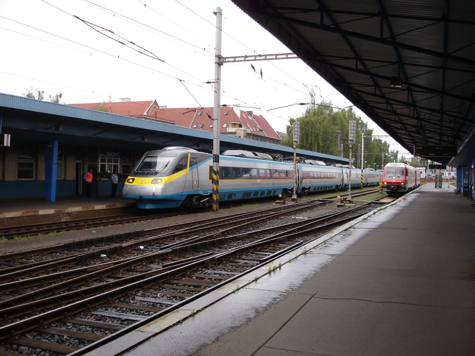 Pendolino ČD-Baureihe 680 im Bahnhof Cheb, Tschechien